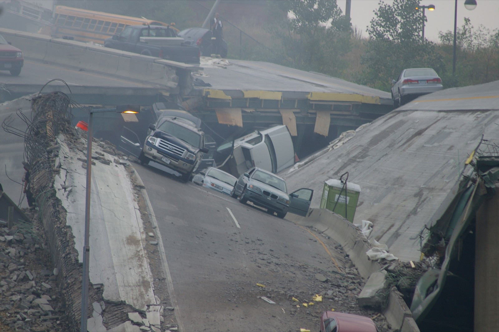 I-35W Mississippi River bridge collapse, Minneapolis, Minnesota